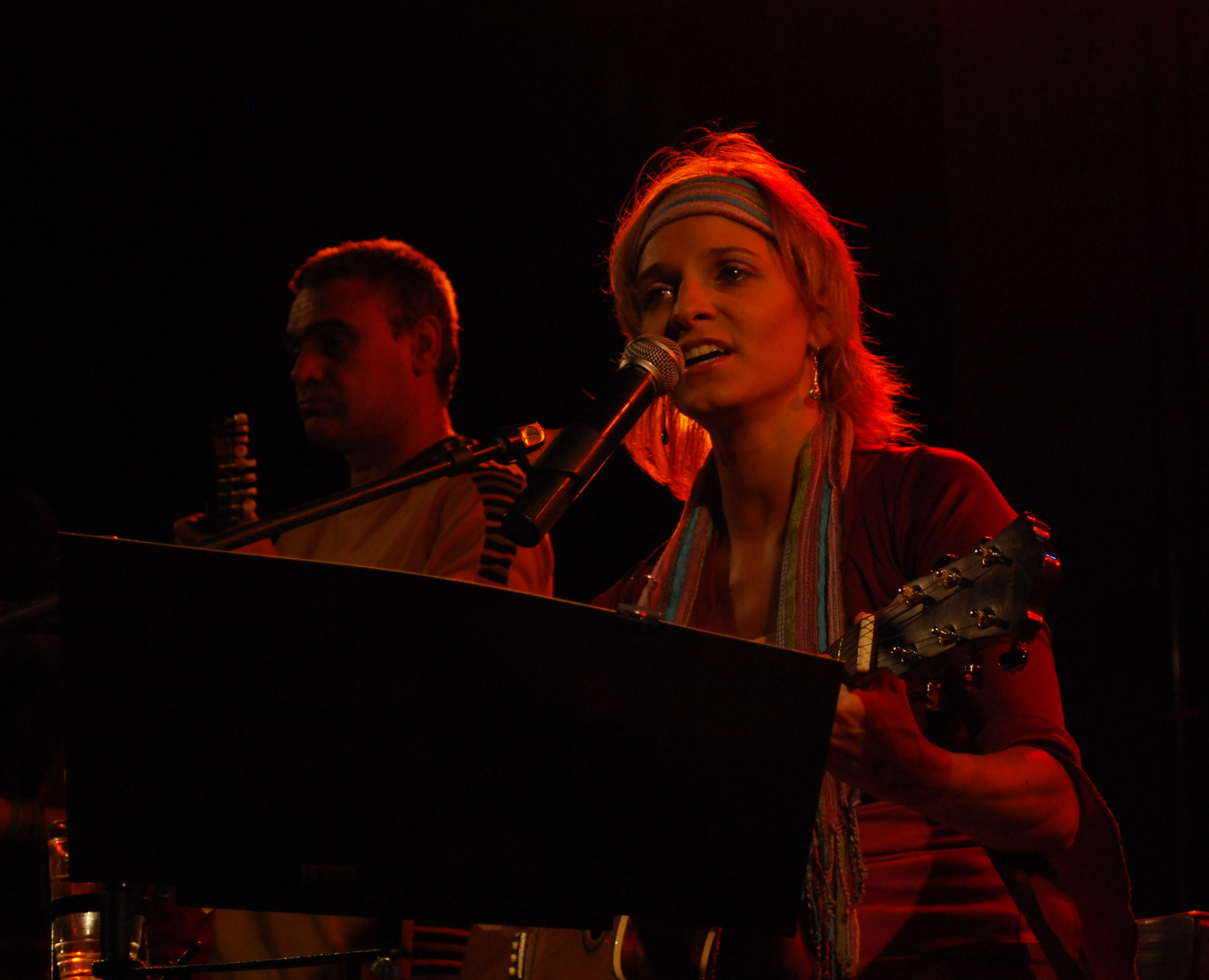 Fotografía de la compositora, guitarrista y cantante de música popular uruguaya Erika Büsch, en un concierto brindado en Atlántida (Departamento de Canelones) - Uruguay, en el cual también actuaron Heber y La Tocata, Mauricio Ubal y la murga Agarrate Catalina.